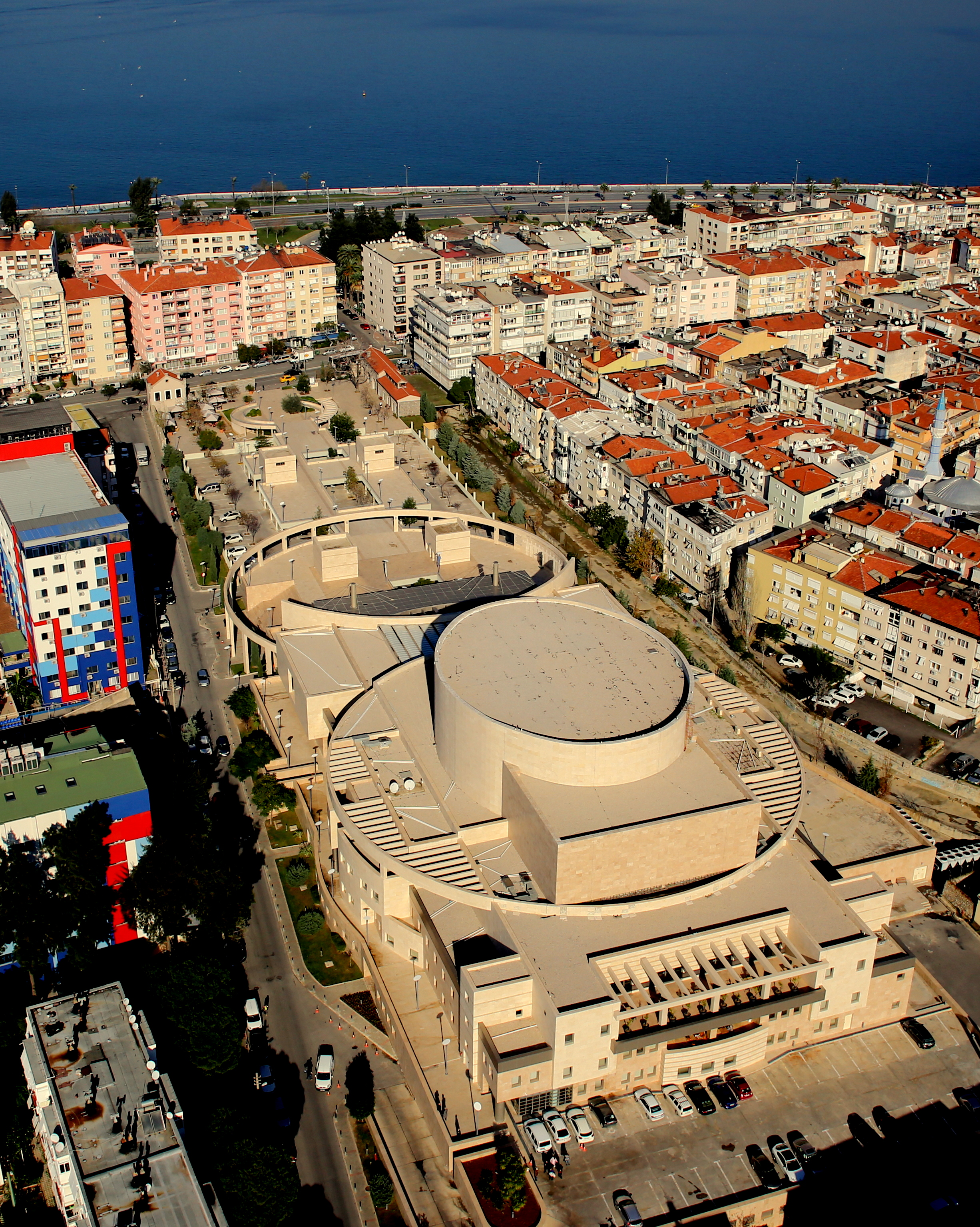 Relation to the urban context of the arts center can be seen.